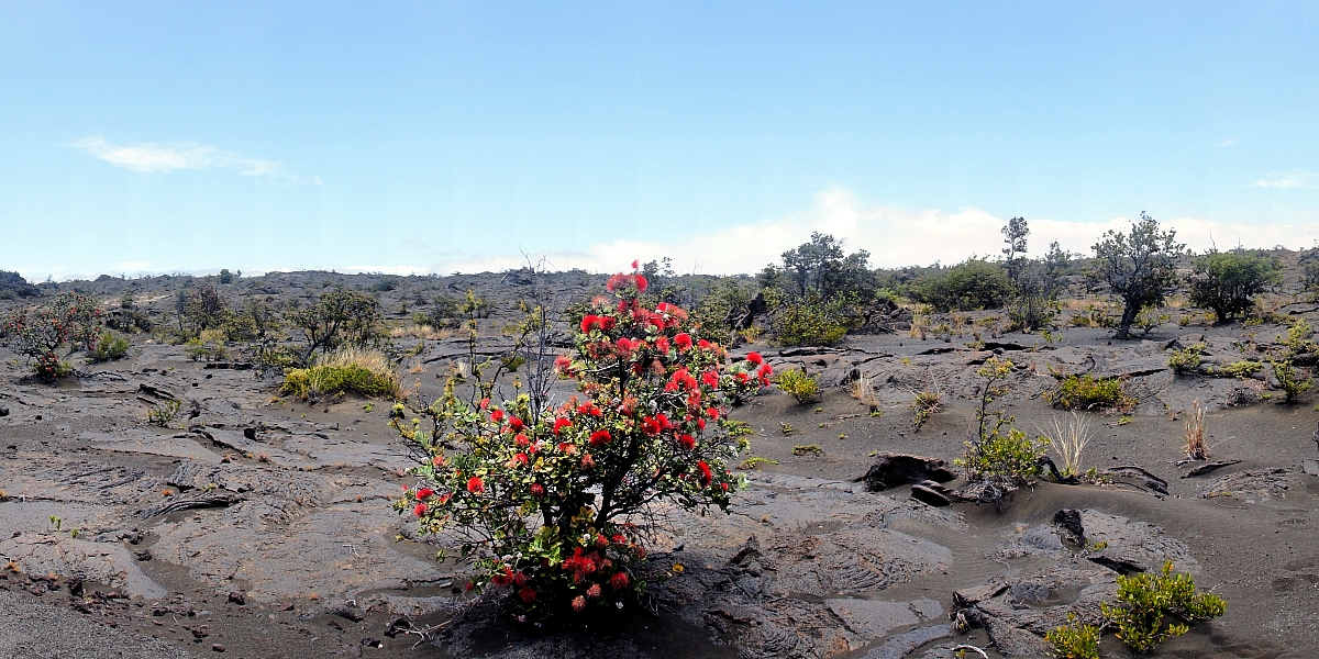 Остров Гвайи. Иллюстрация Второва И.П. для учебника Гавайеведение.